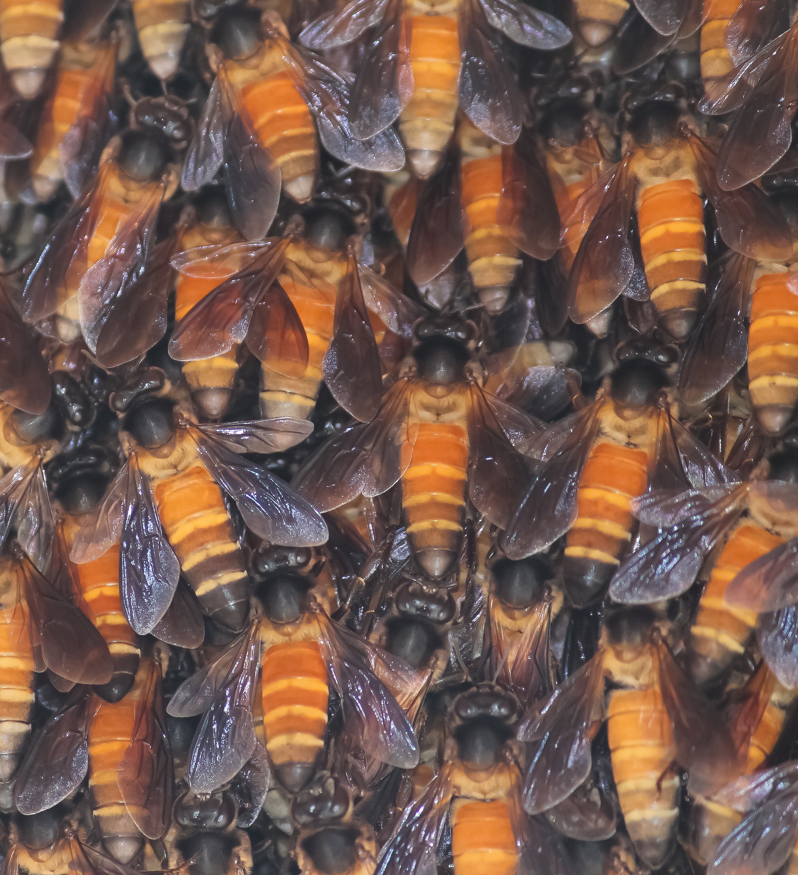 Honeybees in a hive. The hive was built under the fifth floor sun shade of a multi-storey building. The photo was taken during daytime. Location- Kochi, Kerala, India